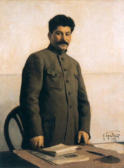 Stalin